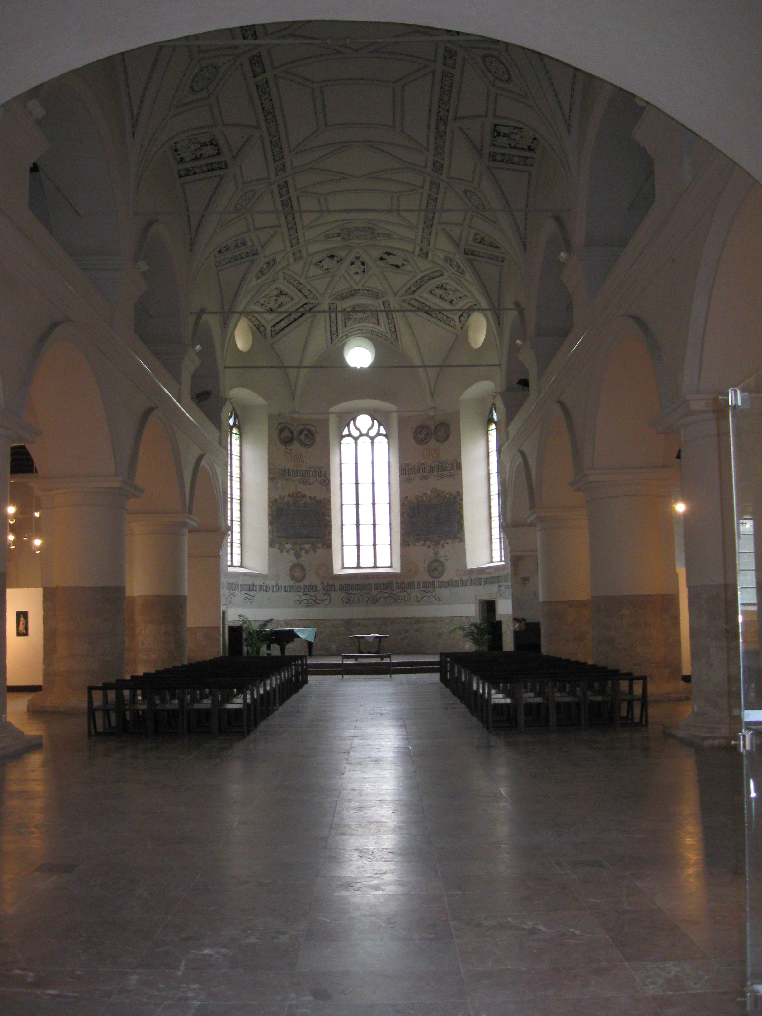 Sbor Českých bratří (Mladá Boleslav), nám. Českobratrské 69, Mladá Boleslav